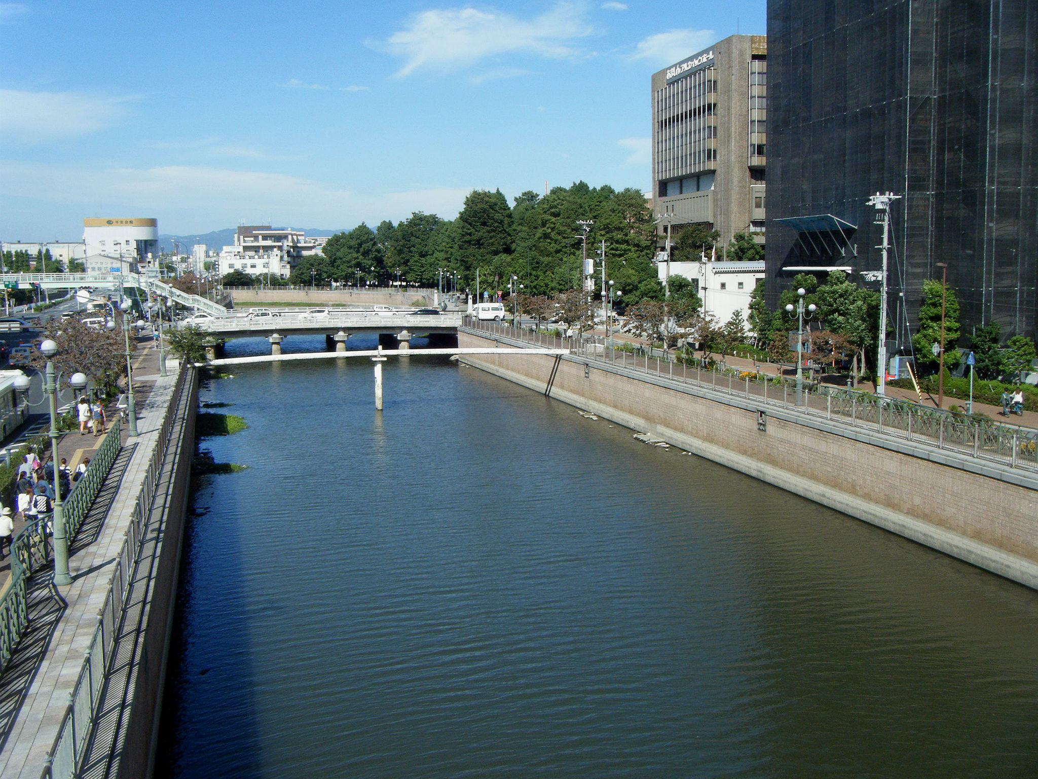 庄下川 国道2号（玉江橋）付近